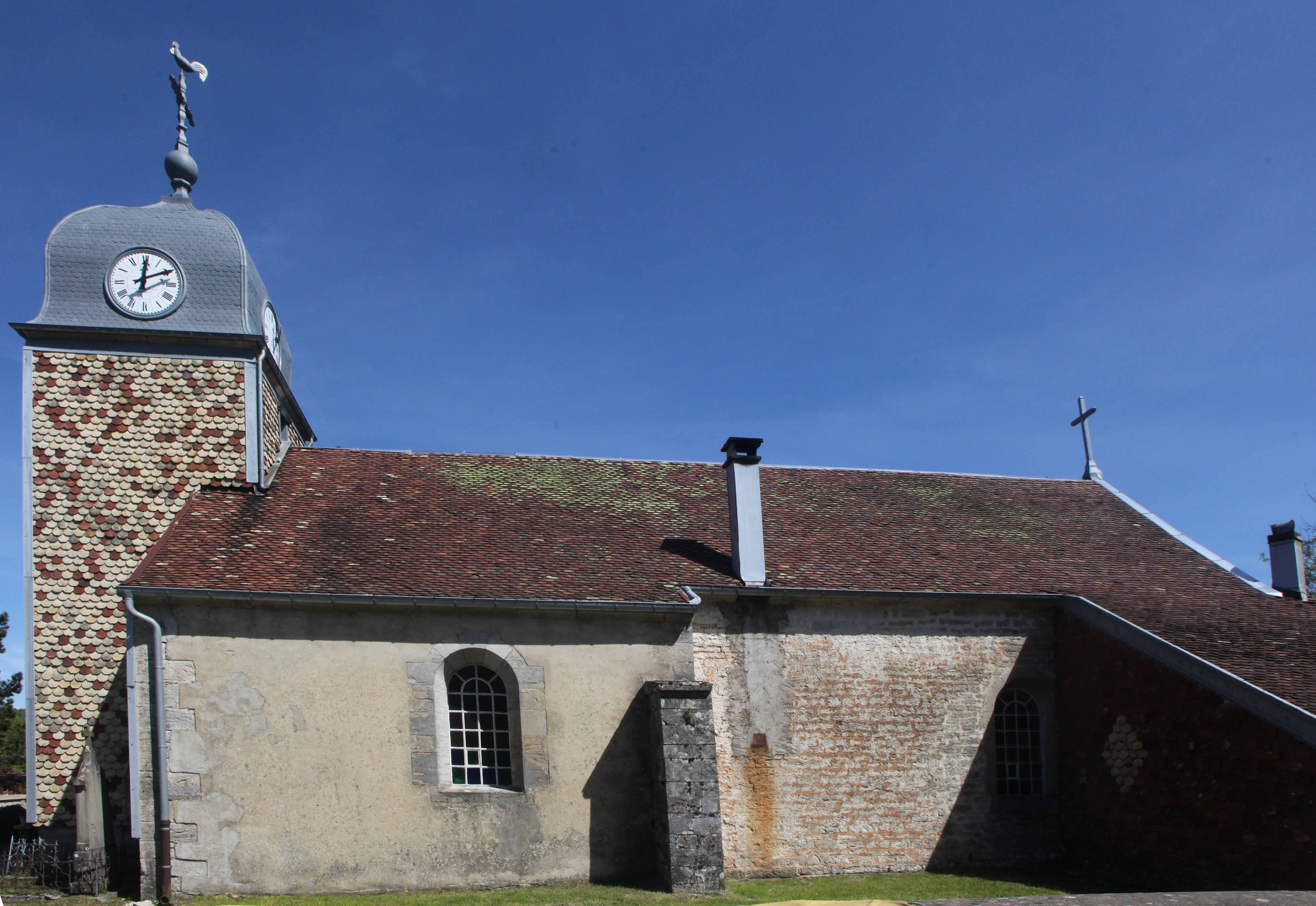 Église de Crouzet-Migette (Doubs).